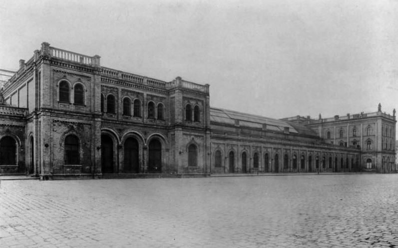 Ein Bahnhof als Vergnügungsstätte! Der schon längere Zeit ausser Betrieb gesetzte Ostbahnhof in Berlin soll in eine Vergnügungsstätte umgewandelt werden. Geplant ist die Errichtung eines Varietes, welches 3.500 Personen fassen soll.